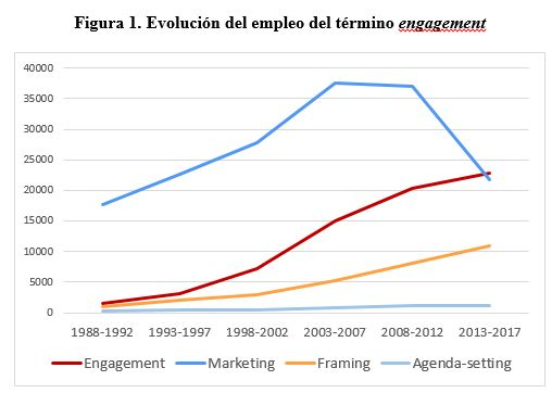 Evolución de las citas académicas sobre engagement en comparación con las de marketing, framing y agenda setting.